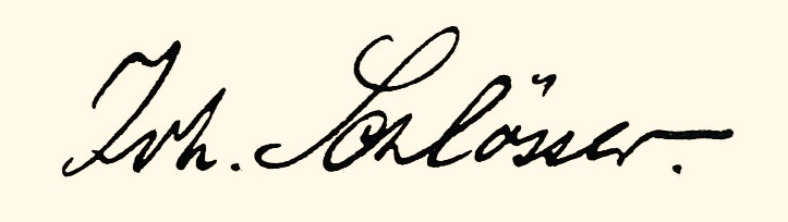 Unterschrift von Johann Heinrich Schloesser (gestorben 1920), Kerzenfabrikant aus Köln